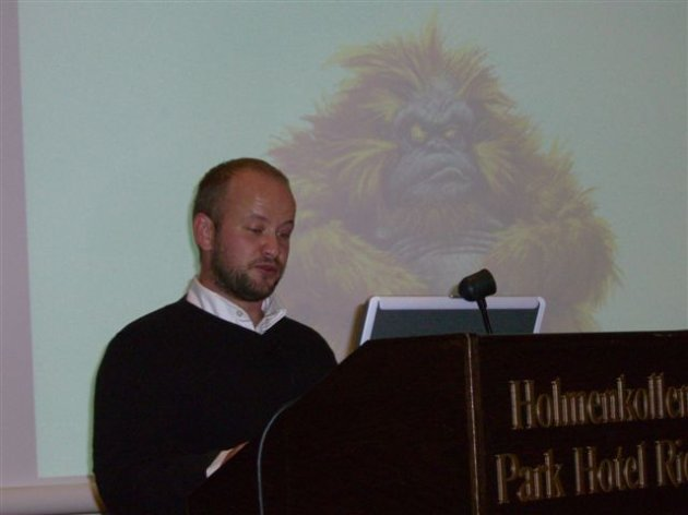 Mikael Scott Bjerkeli på LFTS brukerkonferanse i 2006